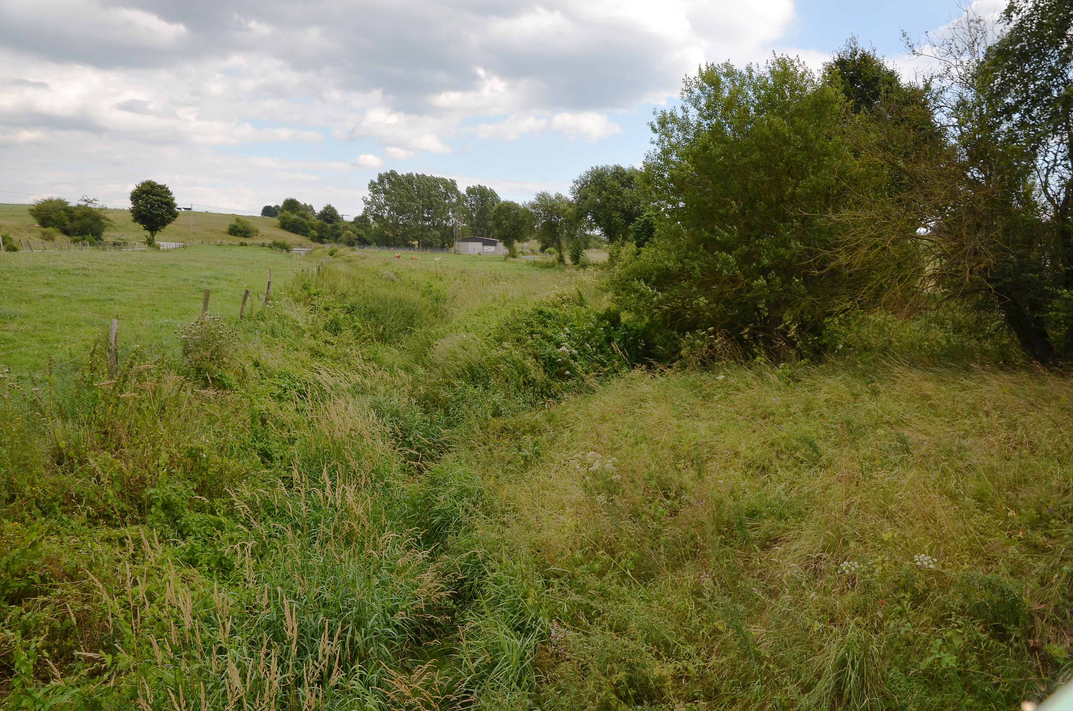 Ab diesem Zusammenfluss der Hunderbecke und der AA, bei Brilon- fünf Brücken, heißt der Fluss wieder Möhne.